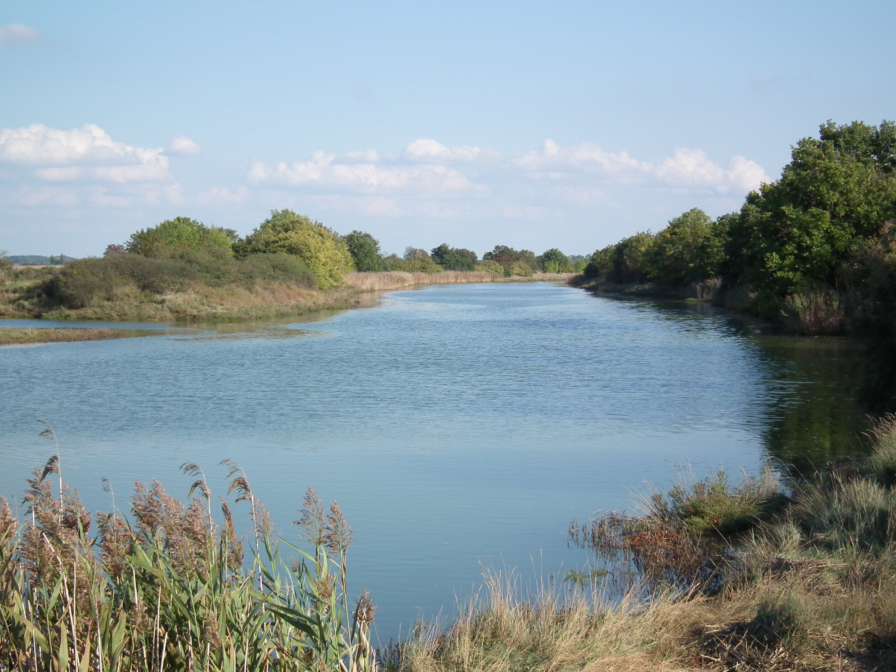 La Seudre à Saujon, en aval du Breuil